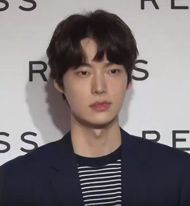 디스패치 구독 클릭! Dispatch Subscribe